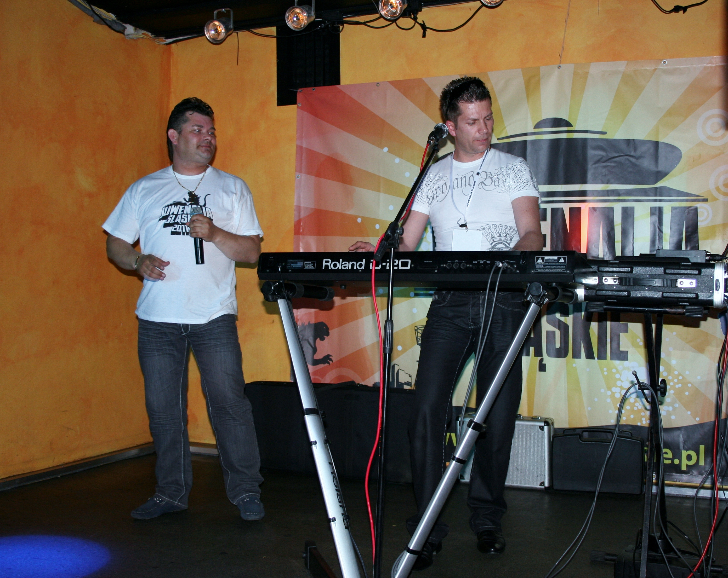 Osiedle Ligota w Katowicach, klub studencki "Straszny Dwór". Zespół Akcent (Disco polo) podczas koncertu w czasie Juwenaliów Śląskich 2011. Z lewej Zenon Martyniuk, z prawej Ryszard Warot.